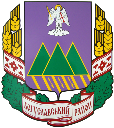 Герб Богуславського району